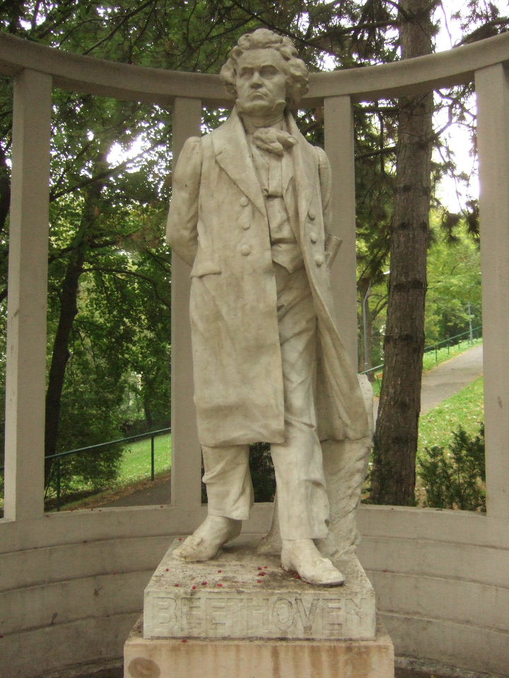 Wien: Beethoven-Denkmal von Robert Weigl im Heiligenstädter Park (1902-1910) Beethoven-Haus Bonn - Digitales Archiv